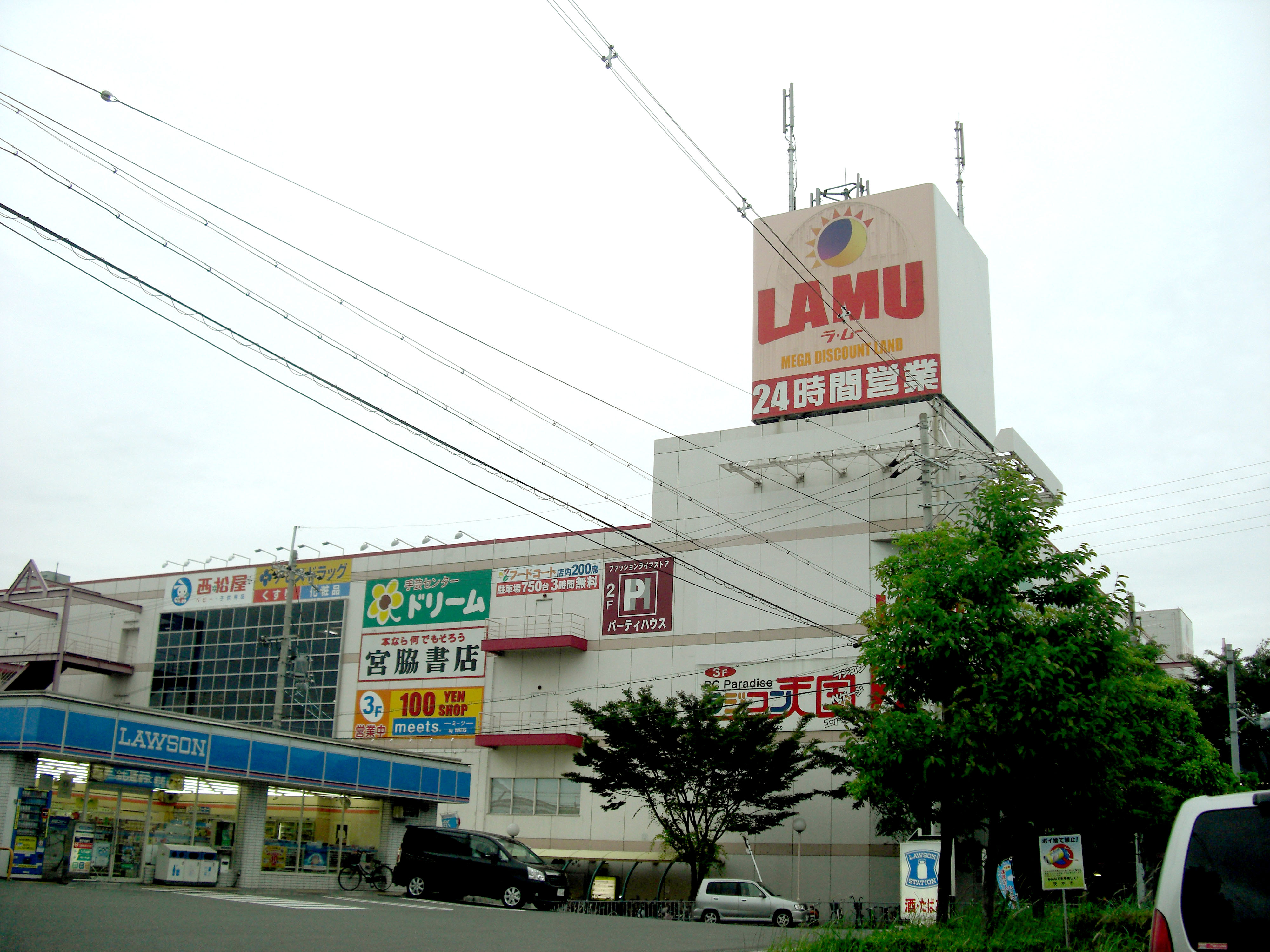 LAMU Minami-Ibaraki,Sawaragihama Ibaraki-City Osaka Japan.